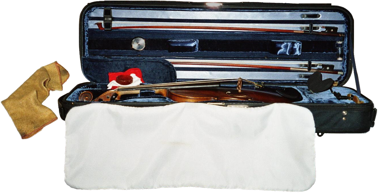 Violin case